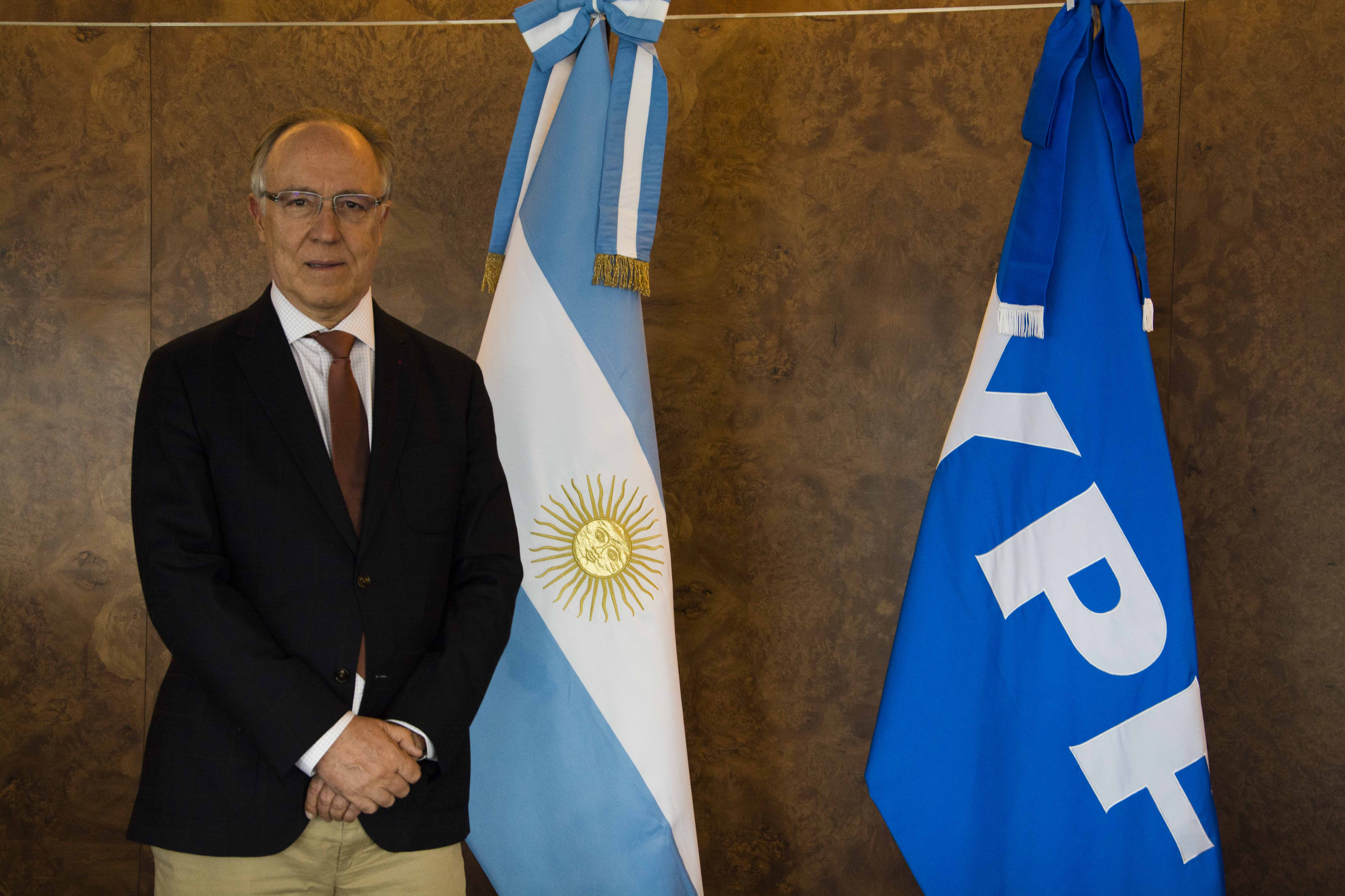 Guillermo Nielsen, Presidente de YPF